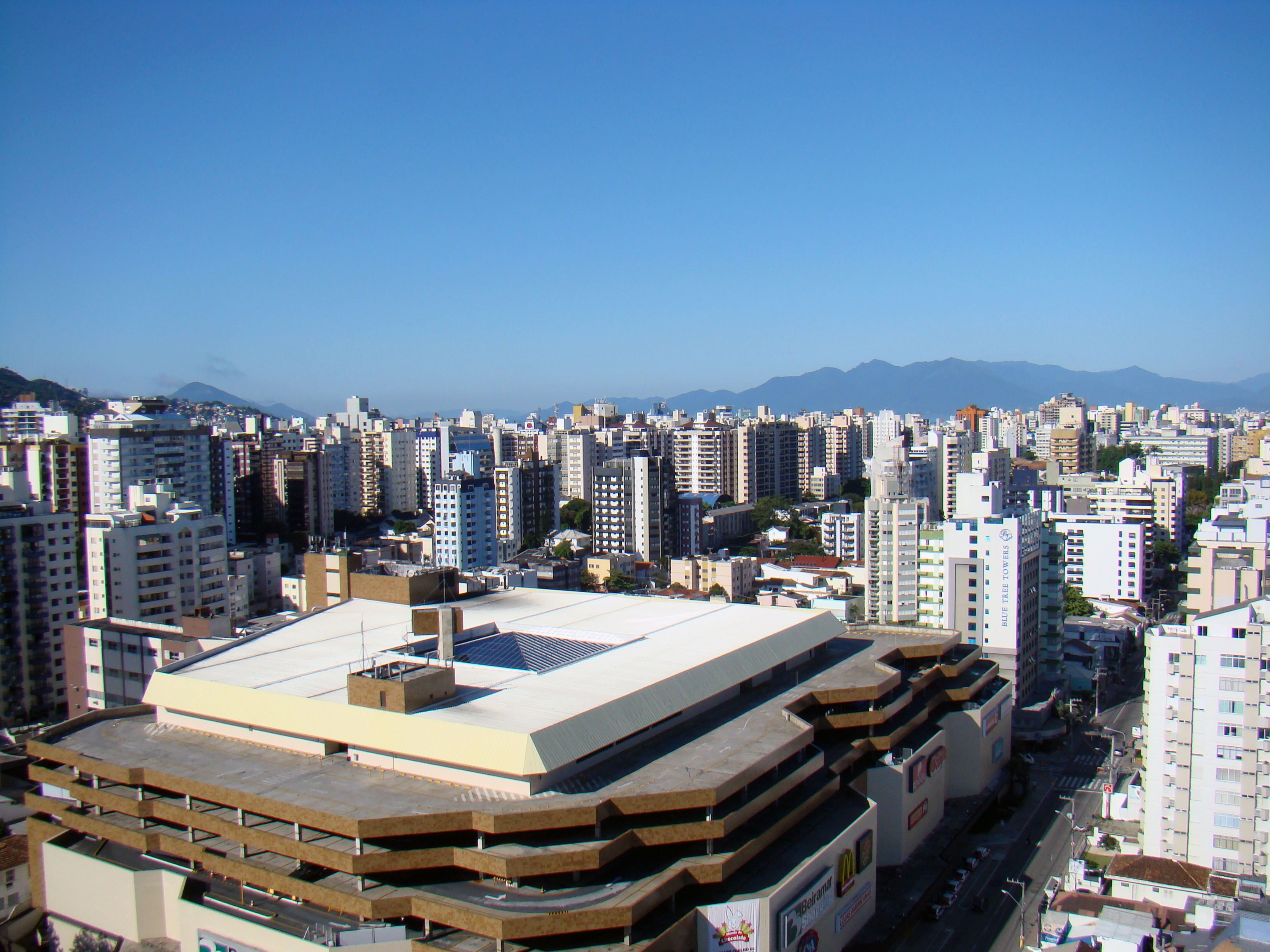 Beira-Mar Shopping e arredores. Florianópolis, Santa Catarina, Brasil.